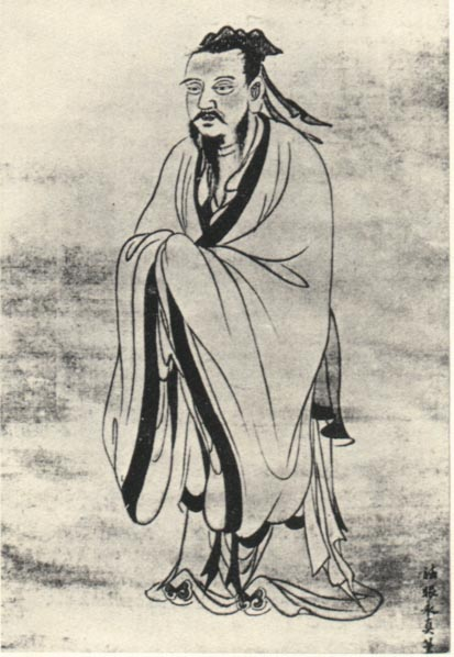 朱舜水 像水墨